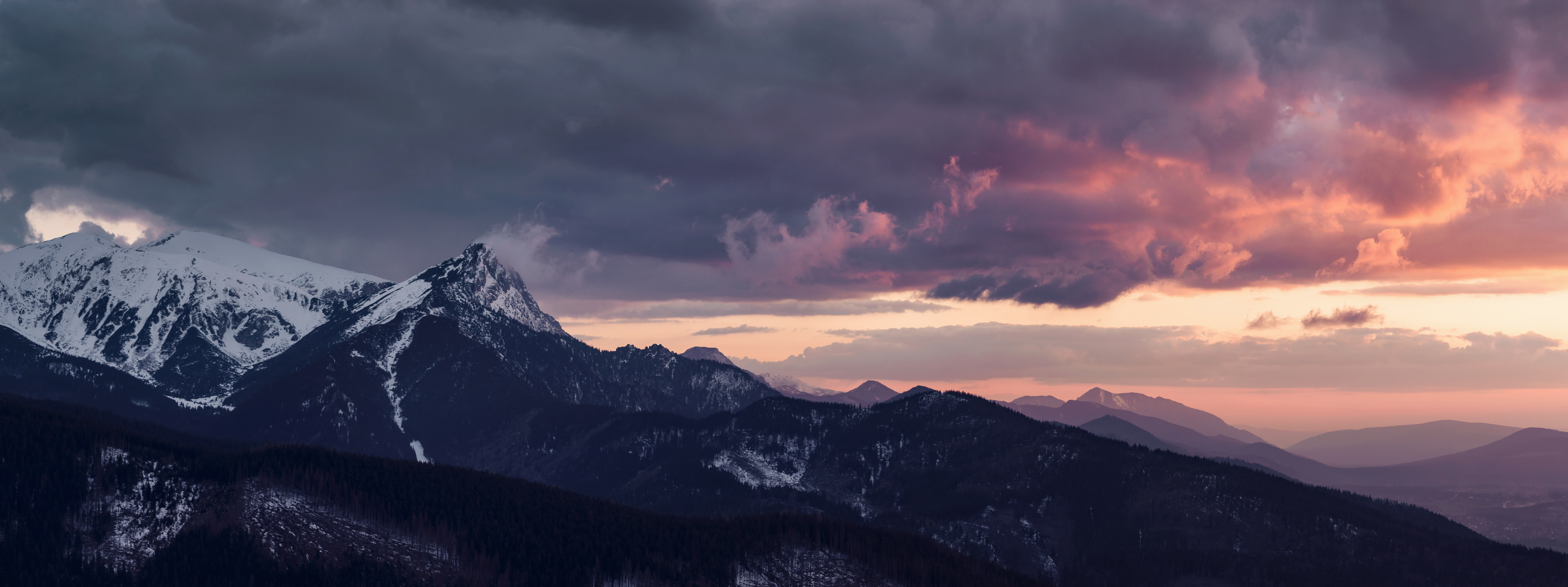 Park narodowy: Tatrzański Park Narodowy This is a photography of protected area with CRFOP ID PL.ZIPOP.1393.PN.14